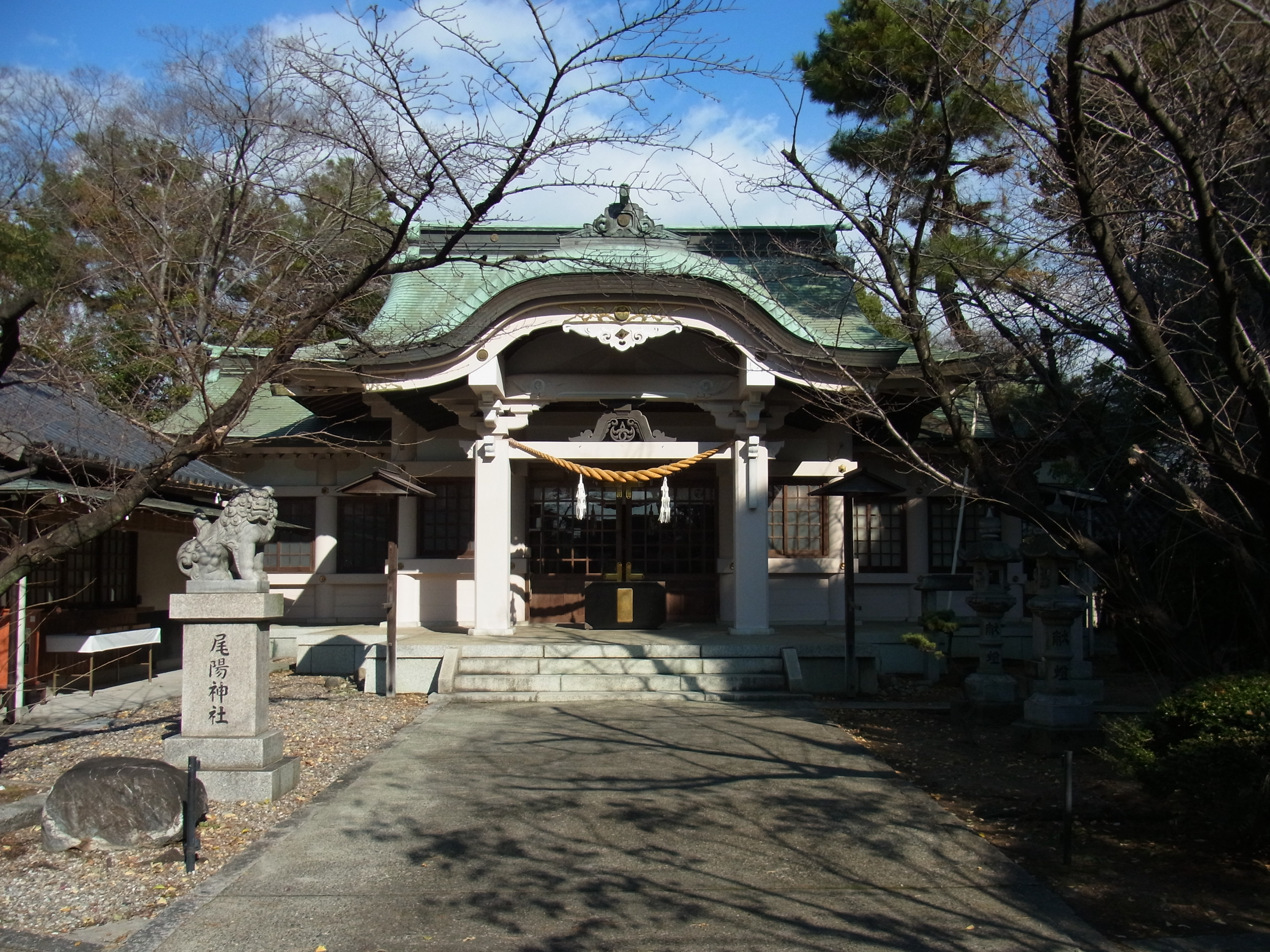 尾陽神社本殿